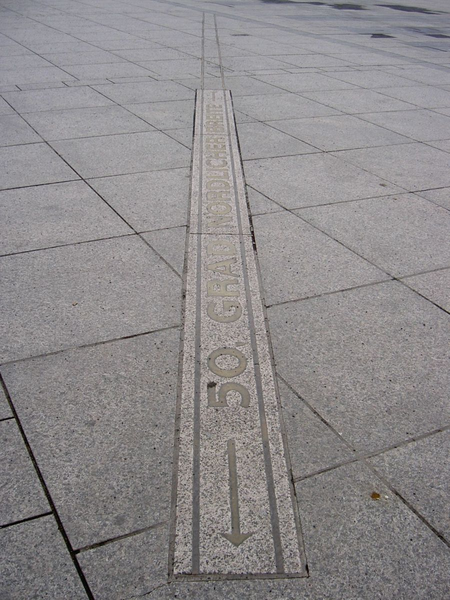 Bildbeschreibung: 50. Breitengrad, Kennzeichnung in der Mainzer Innenstadt Quelle: Eigenes Foto Fotograf/Zeichner: Falense Datum: 01.02.2005